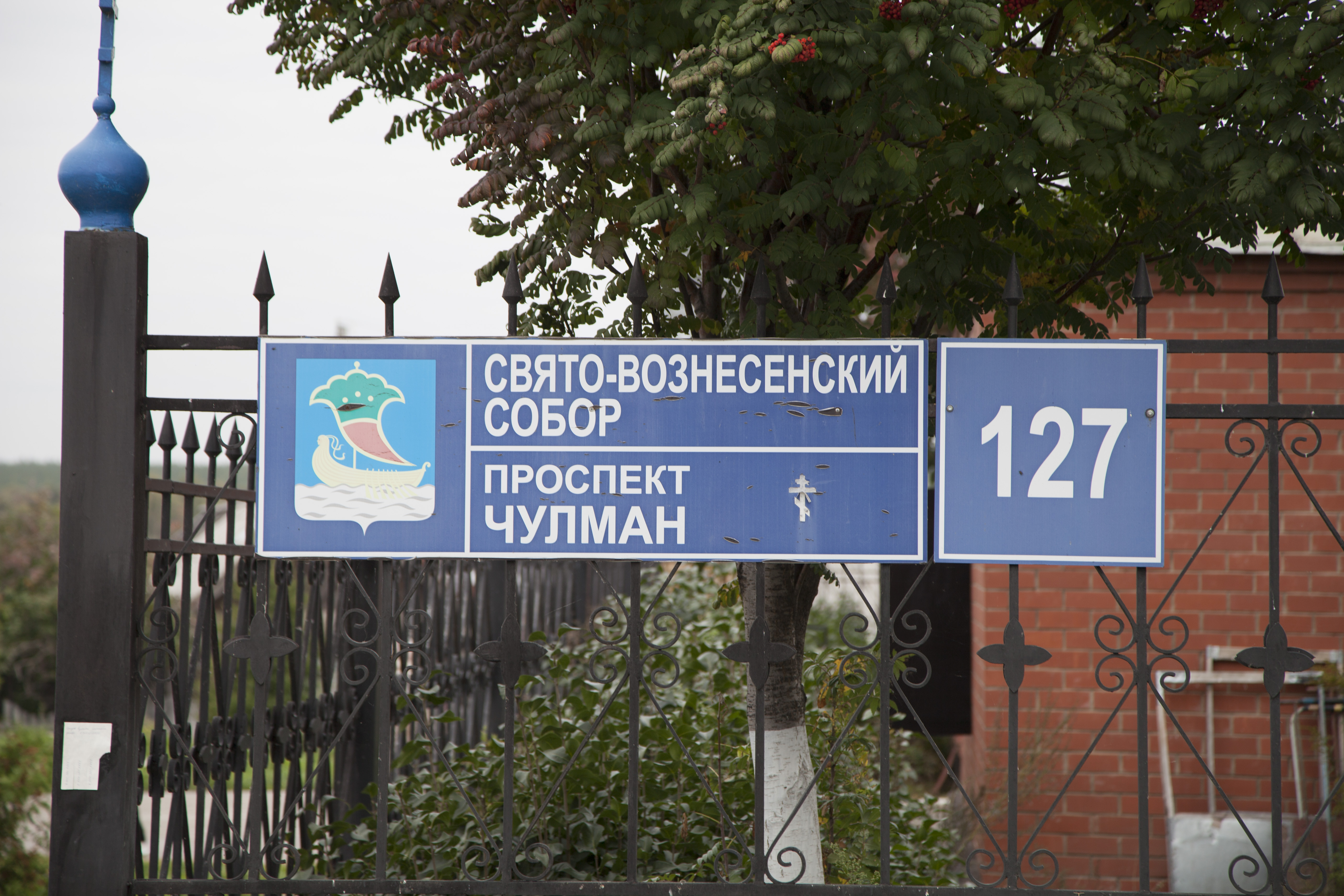 Официальное название памятника культуры.